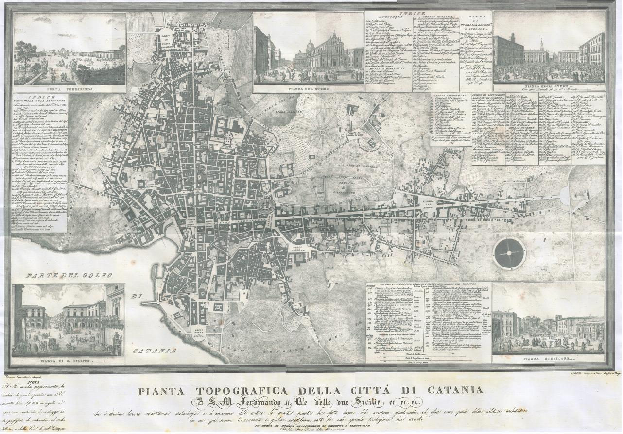 Scansione della planimetria basata sul rilievo architettonico della città di Catania operato dall'architetto Sebastiano Ittar tra il 1806 e il 1832.